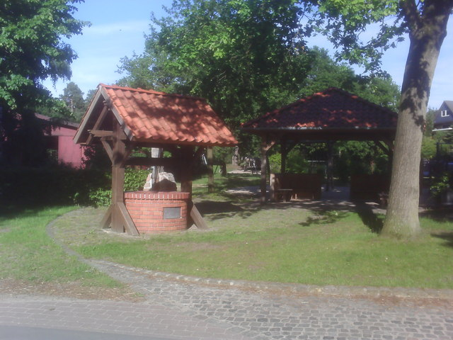 Kirchlinteln: Dorfbrunnen in Hohenaverbergen